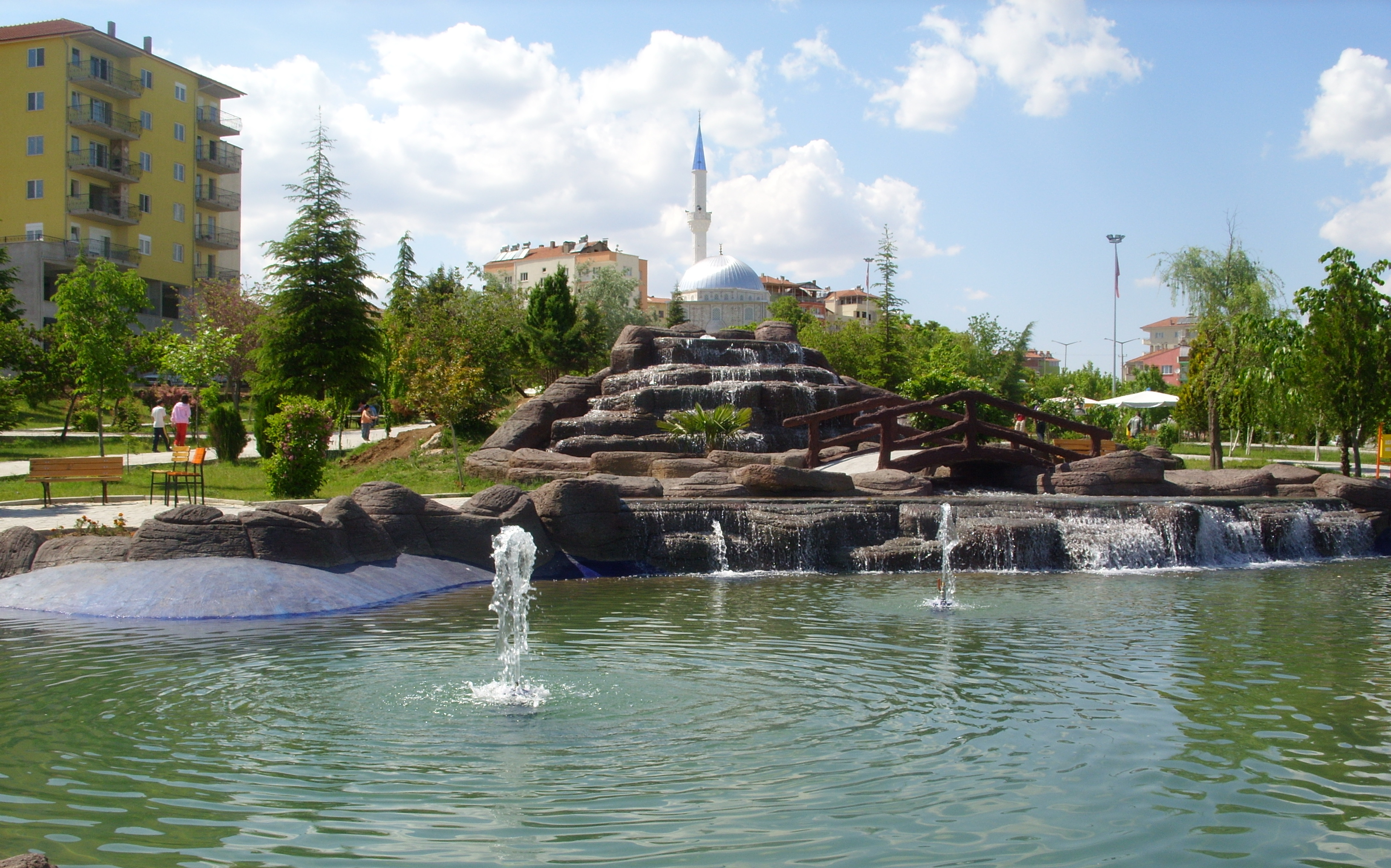 Acıpayam 'Havuzlu Park'